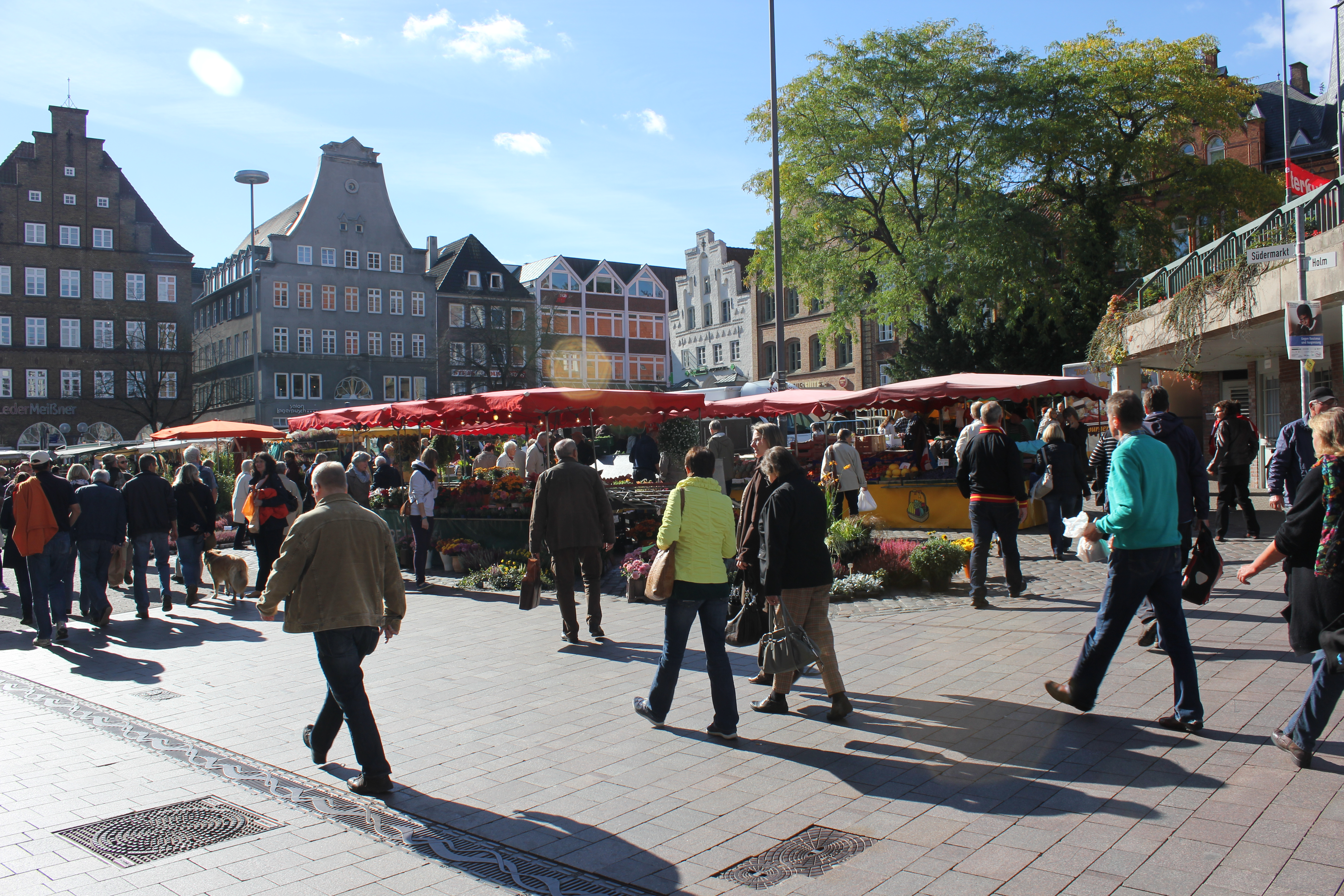 Flensburgs Südermarkt mit dem Wochenmarkt, Bild 007